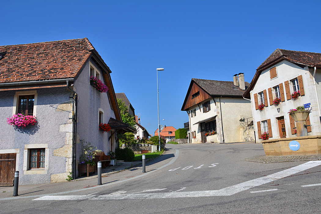 Zentrum von Nods, Kanton Bern